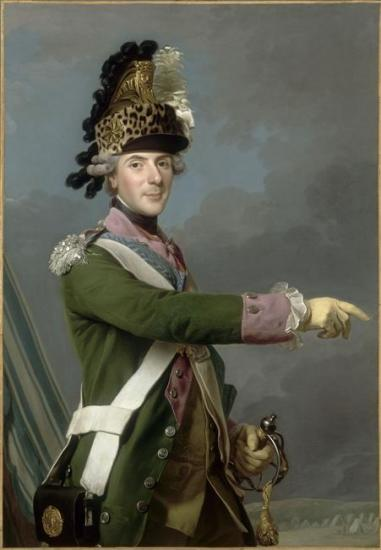 Tableau d'Alexandre Roslin